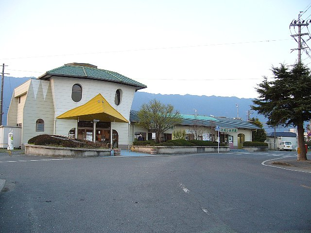 九州旅客鉄道久大本線 田主丸駅 駅舎 2006年3月 Bakkai撮影